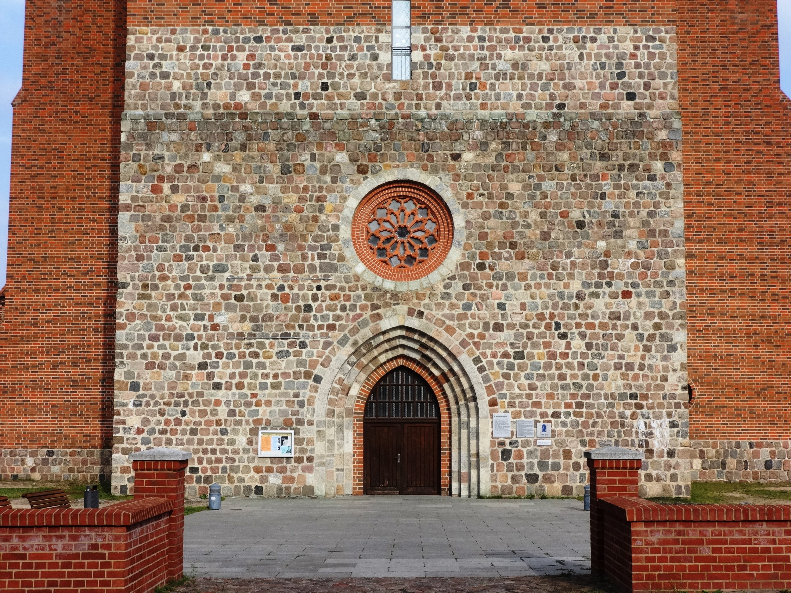 Marienkirche in Pasewalk, Mecklenburg-Vorpommern